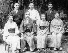 上島家 下段 左から長女マツ，上島正，妻モト，次女タケ。上 段は不明。（長女マツは米倉勝之助と，次女タケは小池嘉一郎と 結婚） 米倉勝美著『おやじの背中・我が家百年の歩み』